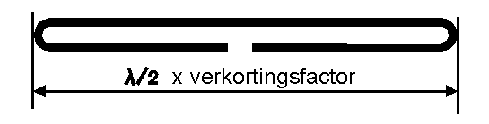 Zelfgemaakte computerschets van gevouwen dipool antenne